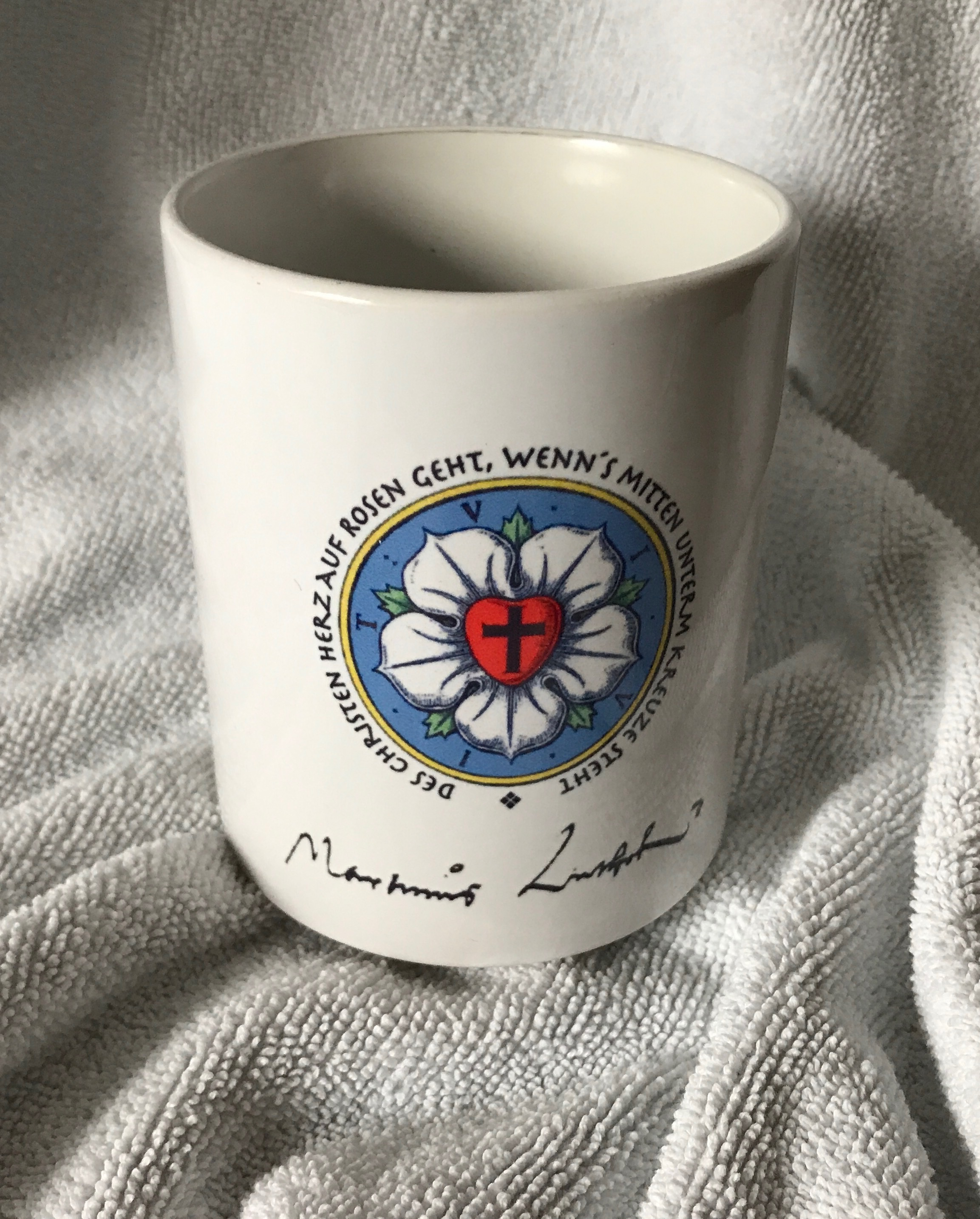 Das Bild zeigt die Luther-Rose mit Unterschrift Martin Luthers auf einem Kaffeebecher den die Lutheriden-Vereinigung e.V. für seine Mitglieder herstellen lies